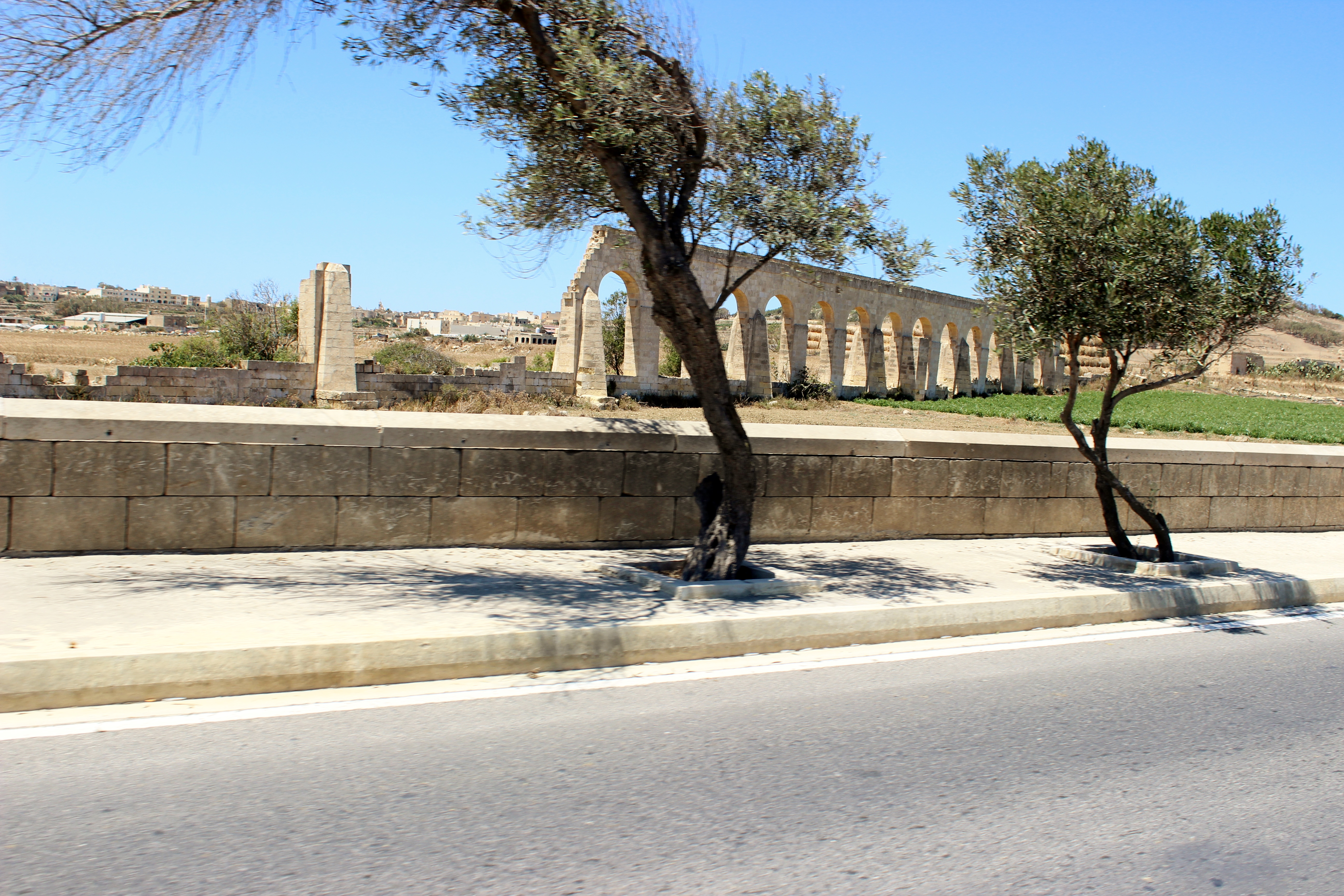 Gozo